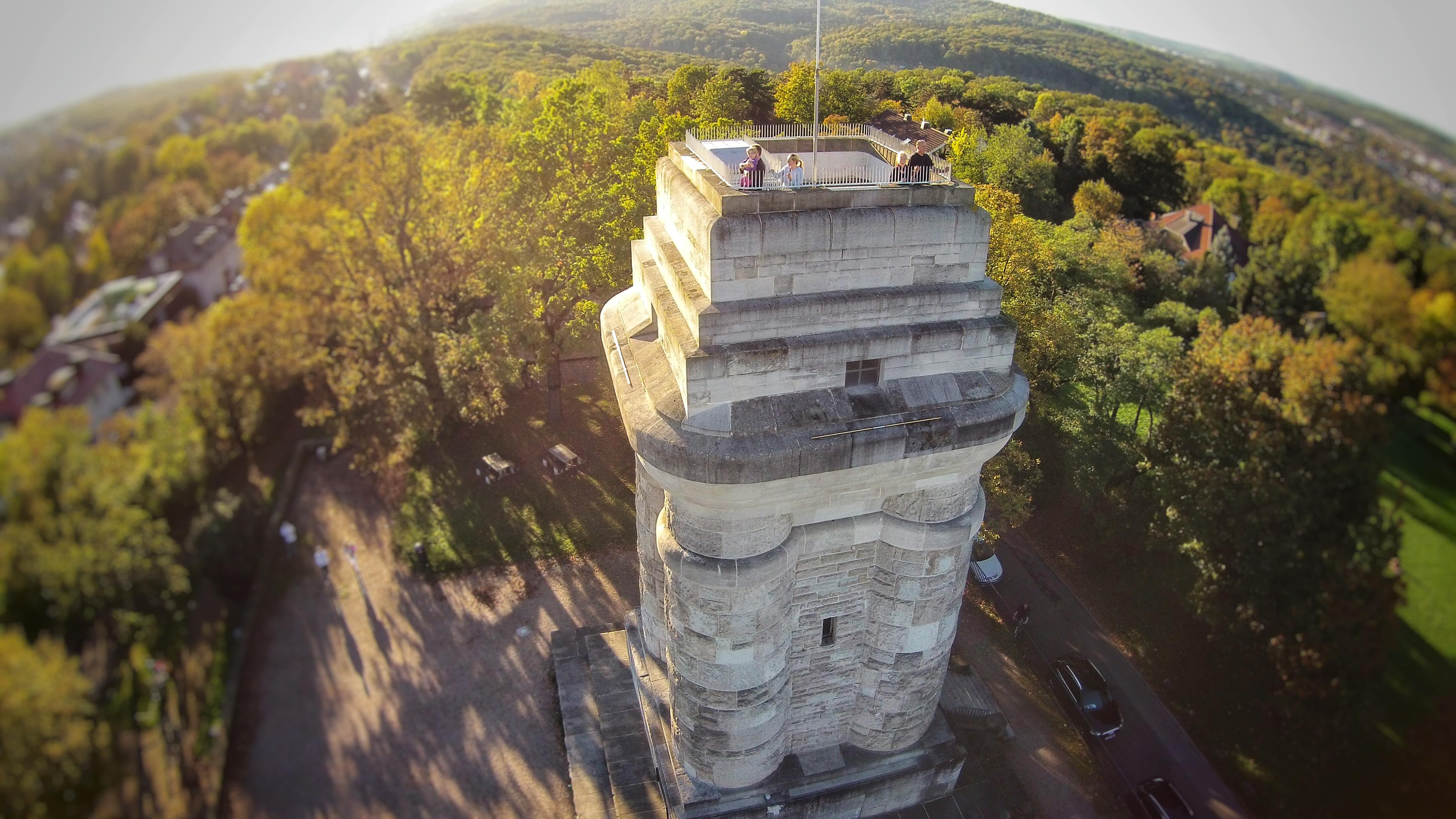 Bismarckturm (Stuttgart) aus Richtung Ost. Zu sehen sind Besucher auf der Aussichtsplattform, die die Aussicht über Stuttgart genießen.